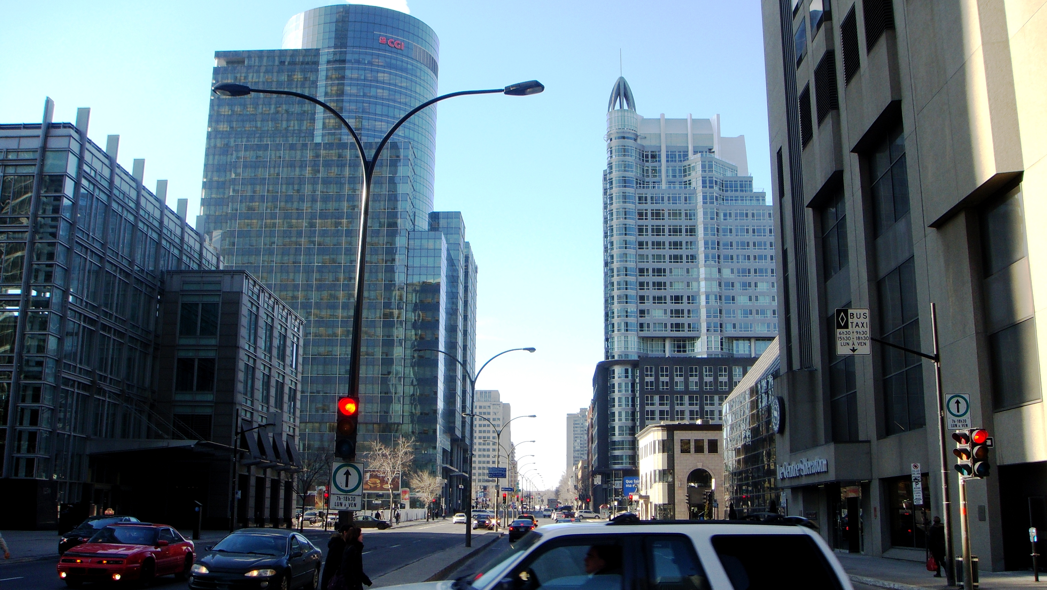 Le Crystal de la Montagne est un édifice de Montréal de 28 étages. Projet à Montréal de type résidences-hôtel, il est composé de la partie résidentielle de 57 unités et de la partie hôtelière de 131 suites. Situé angle Nord-Ouest rue de la Montagne et du boulevard René-Lévesque, cet édifice sera la première tour d'habitation située directement dans le centre-ville de Montréal, à deux minutes des plus hauts gratte-ciel de la ville.